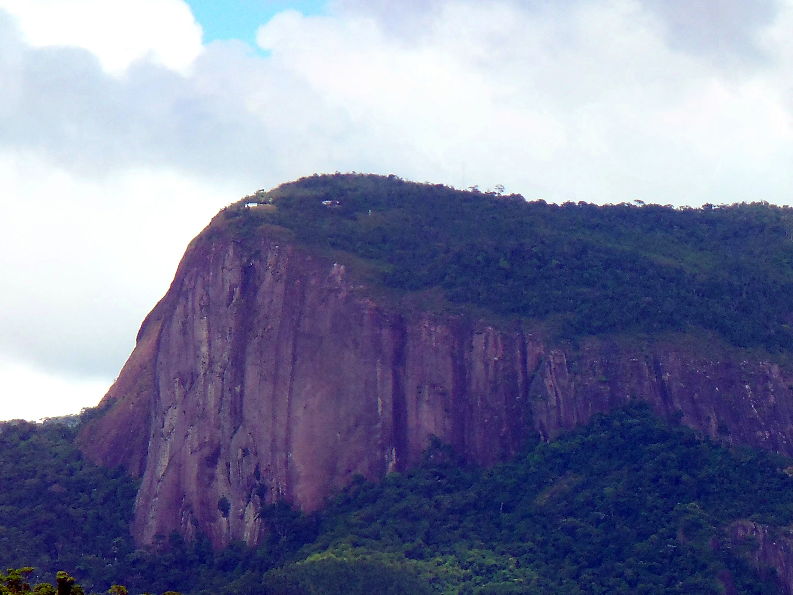 Goiapaba-Açu visto a partir do Tropical Campestre Clube.